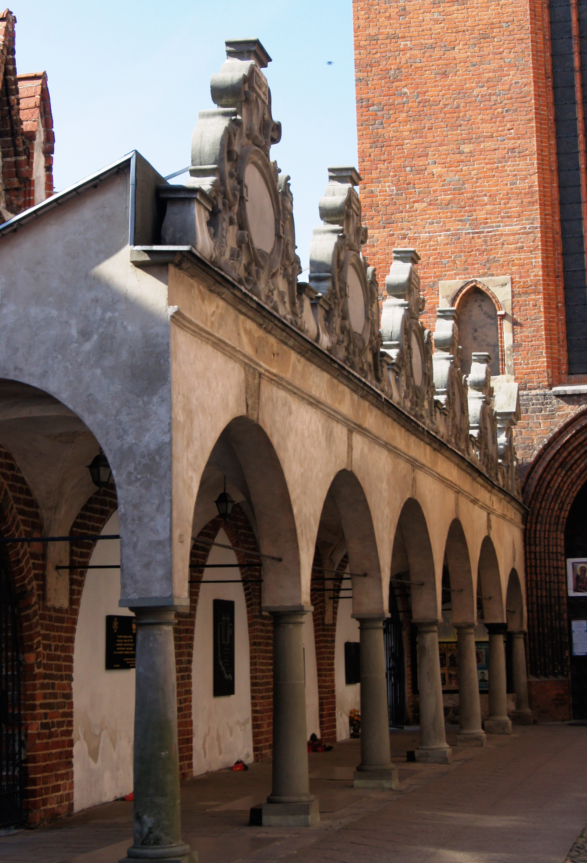 Toruń Stare Miasto - dawny kościół klasztorny franciszkanów, obecnie parafialny pw. Wniebowzięcia NMP, krużganek (zabytek nr A/406 z 24.10.1929)